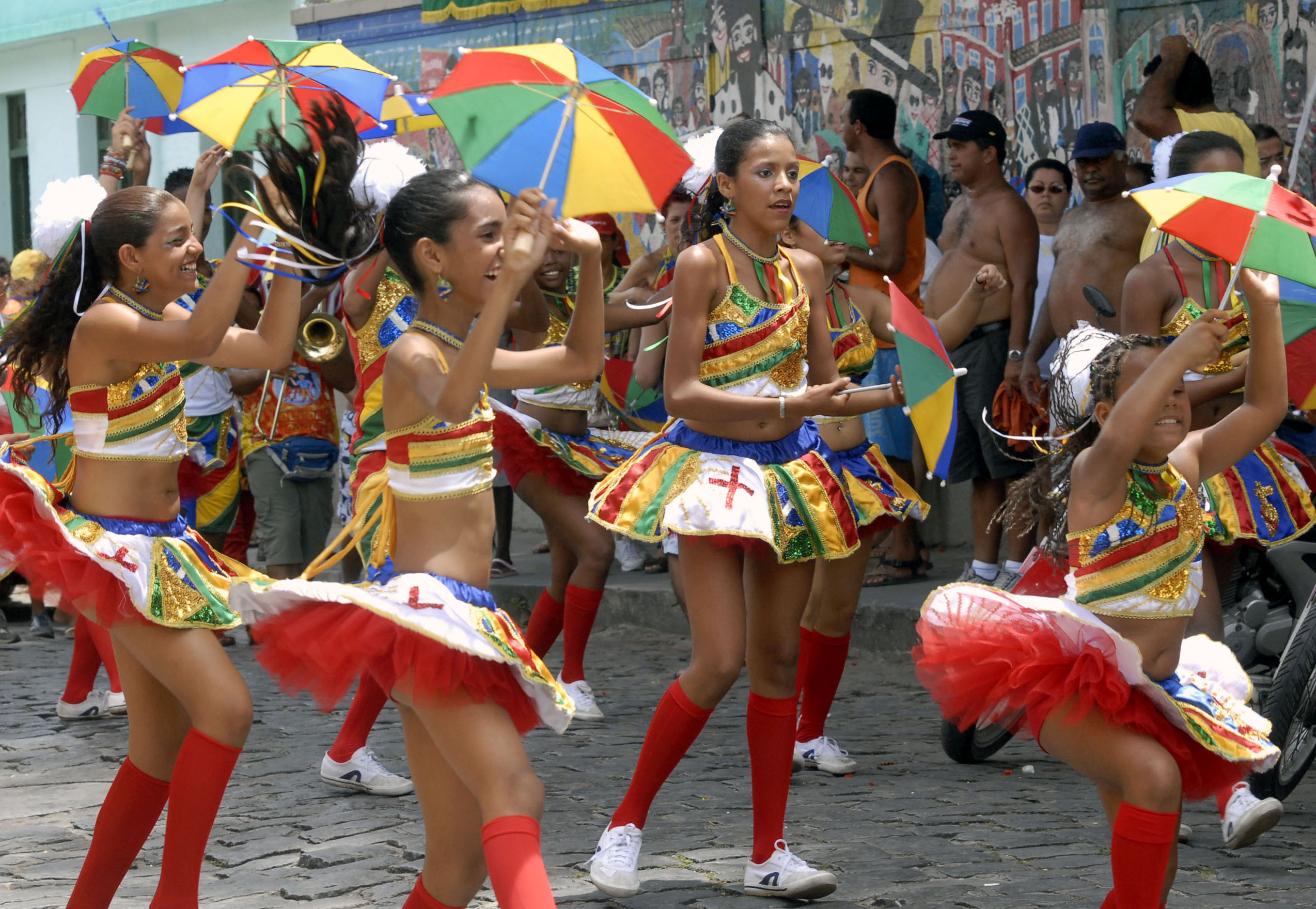 Bloco de rua, Carnaval do Olinda, Pernambuco, Brazil